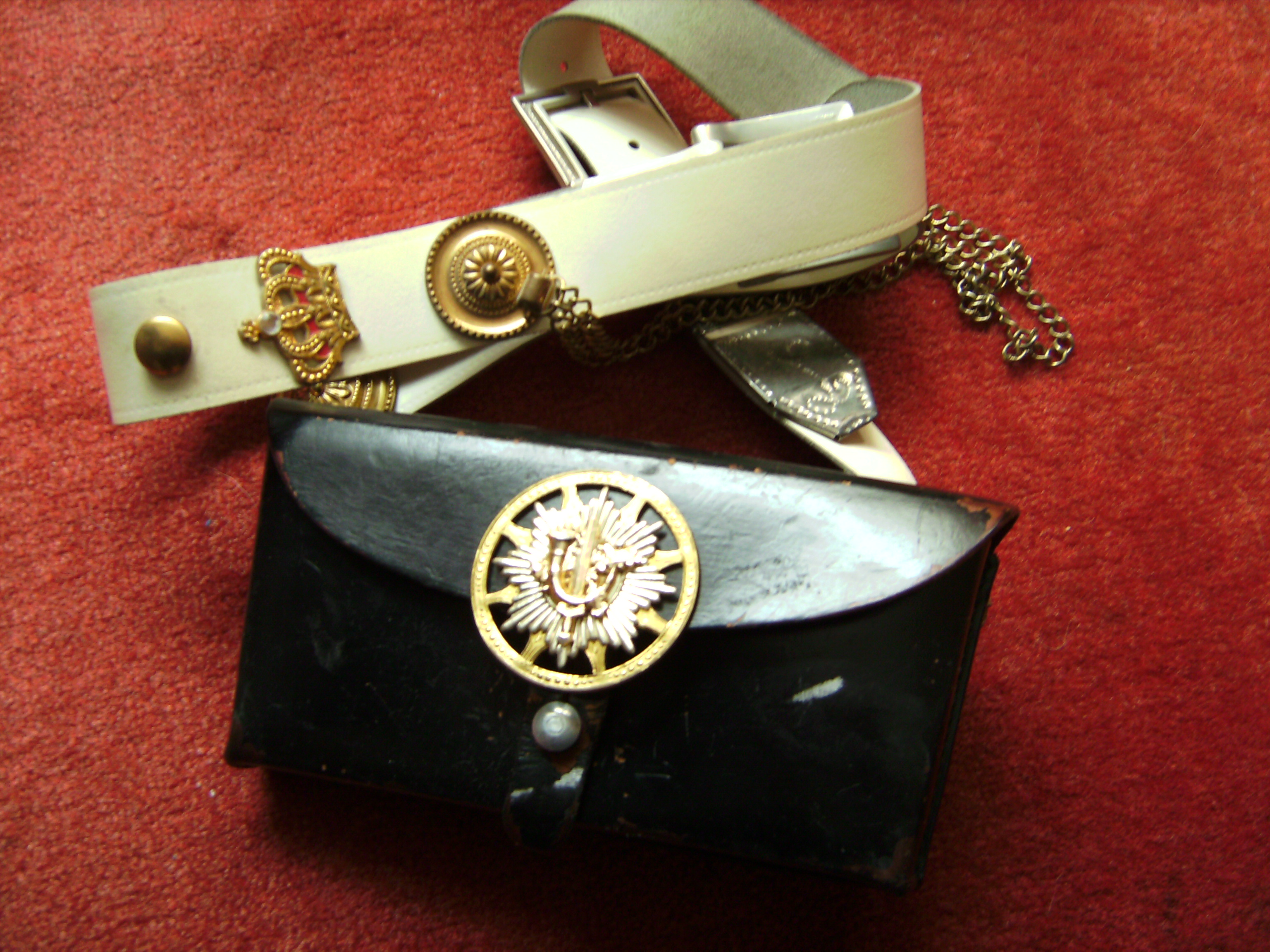 Kartusche der Chevauxlegérs-Lanciers des Louis Napoleon, König von Hollnad